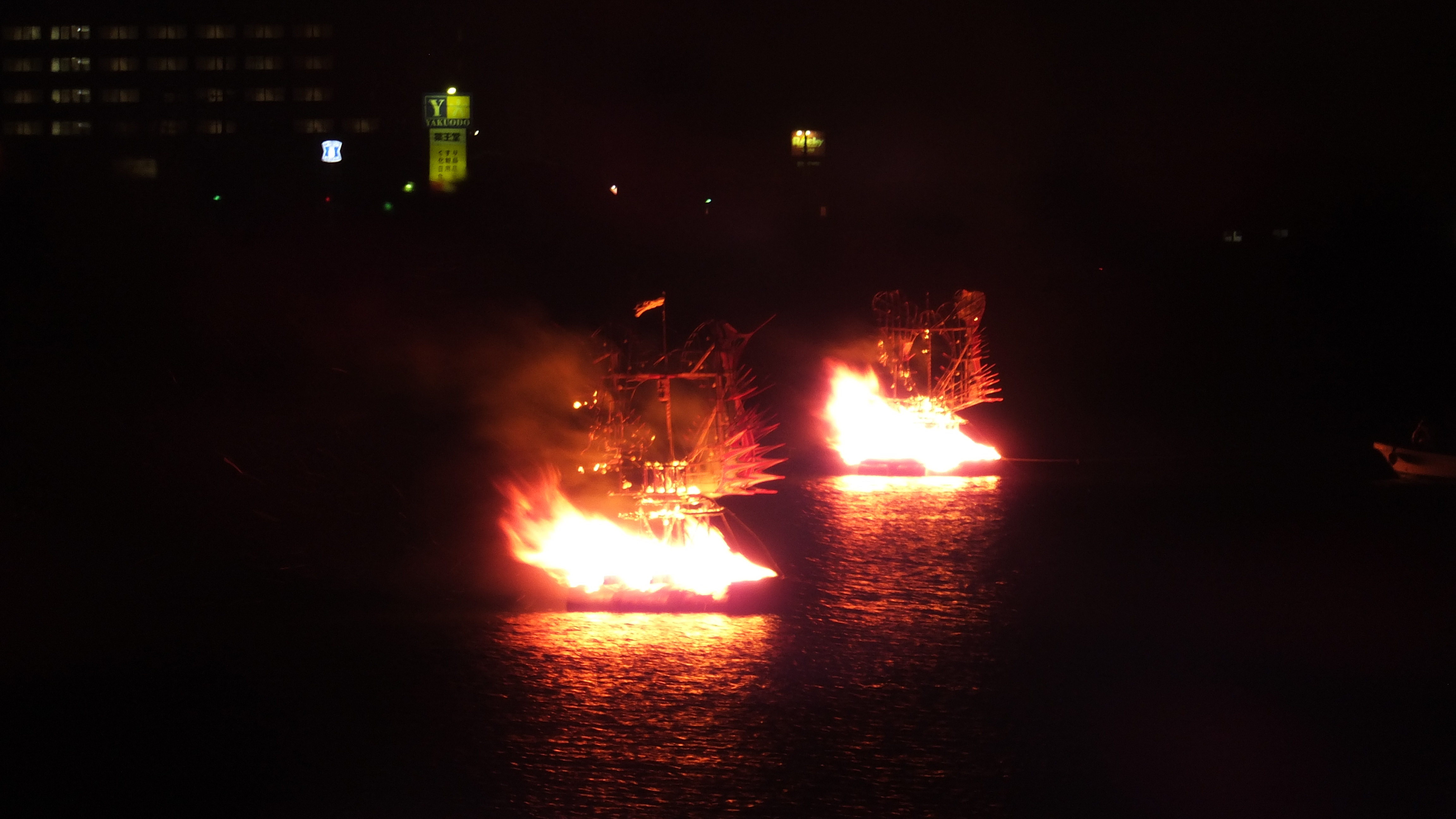 能代役七夕の鯱流し行事。2日目の8月7日に灯篭上部にある鯱飾りが切り離され、米代川に流して焼き上げられる。